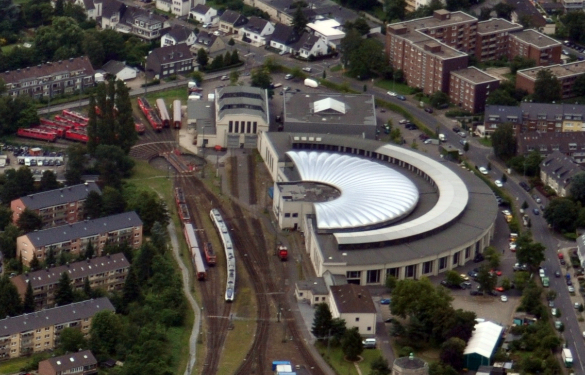 Ringlokschuppen im Düsseldorfer Abstellbahnhof. Er wird heute als kommerzielles Autooldtimergelände genutzt. Luftaufnahme aus einer Höhe von ca. 600m über Grund